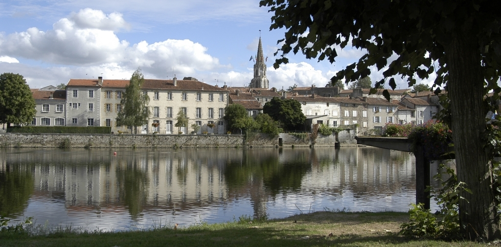 Aperçu de la mairie